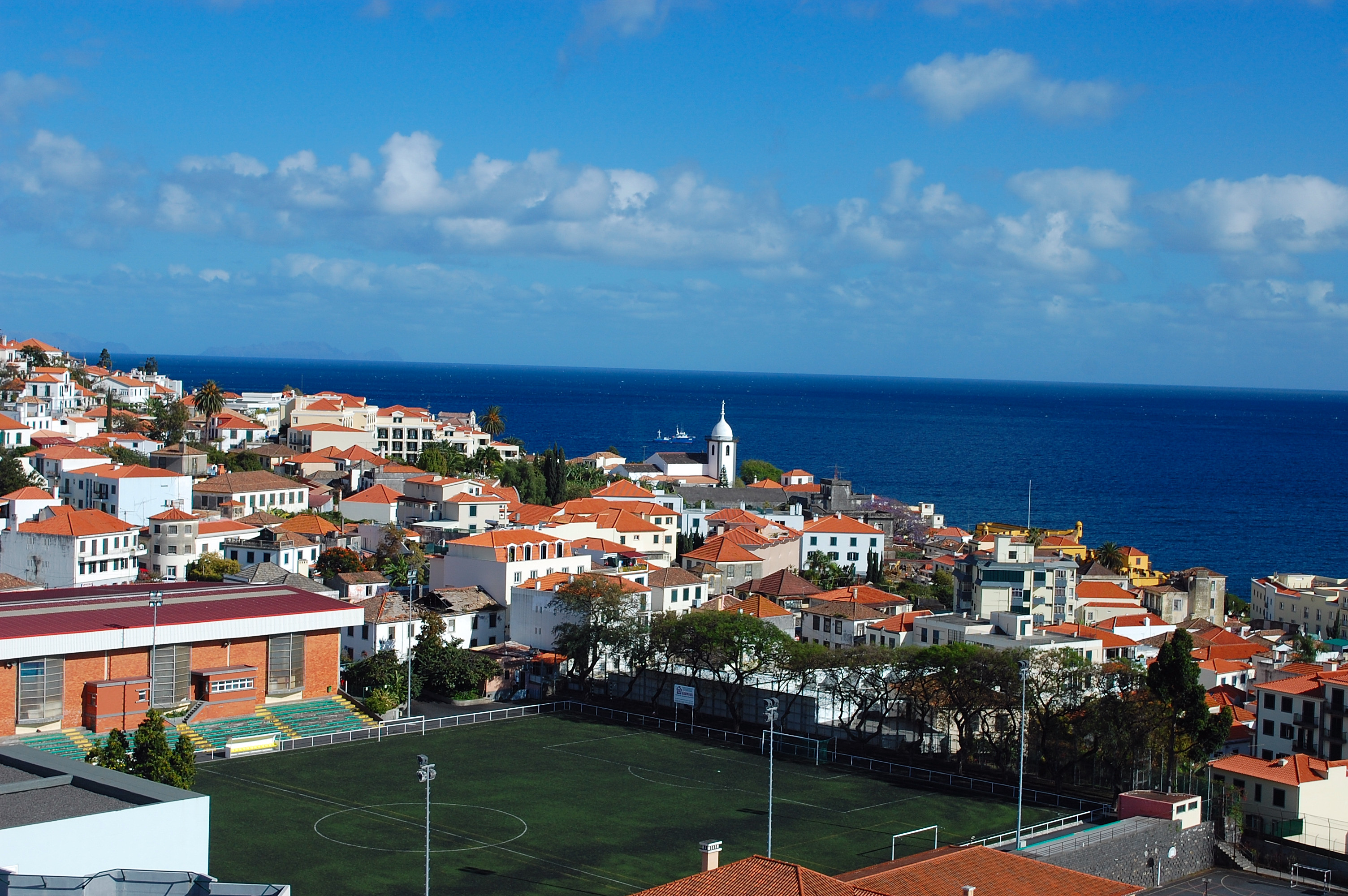 Santa Maria Maior, Funchal